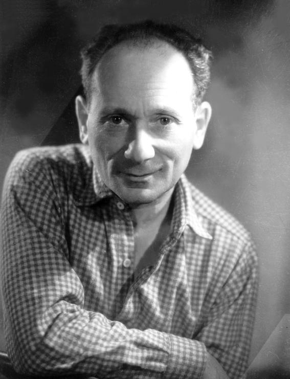 Julian Stryjkowski